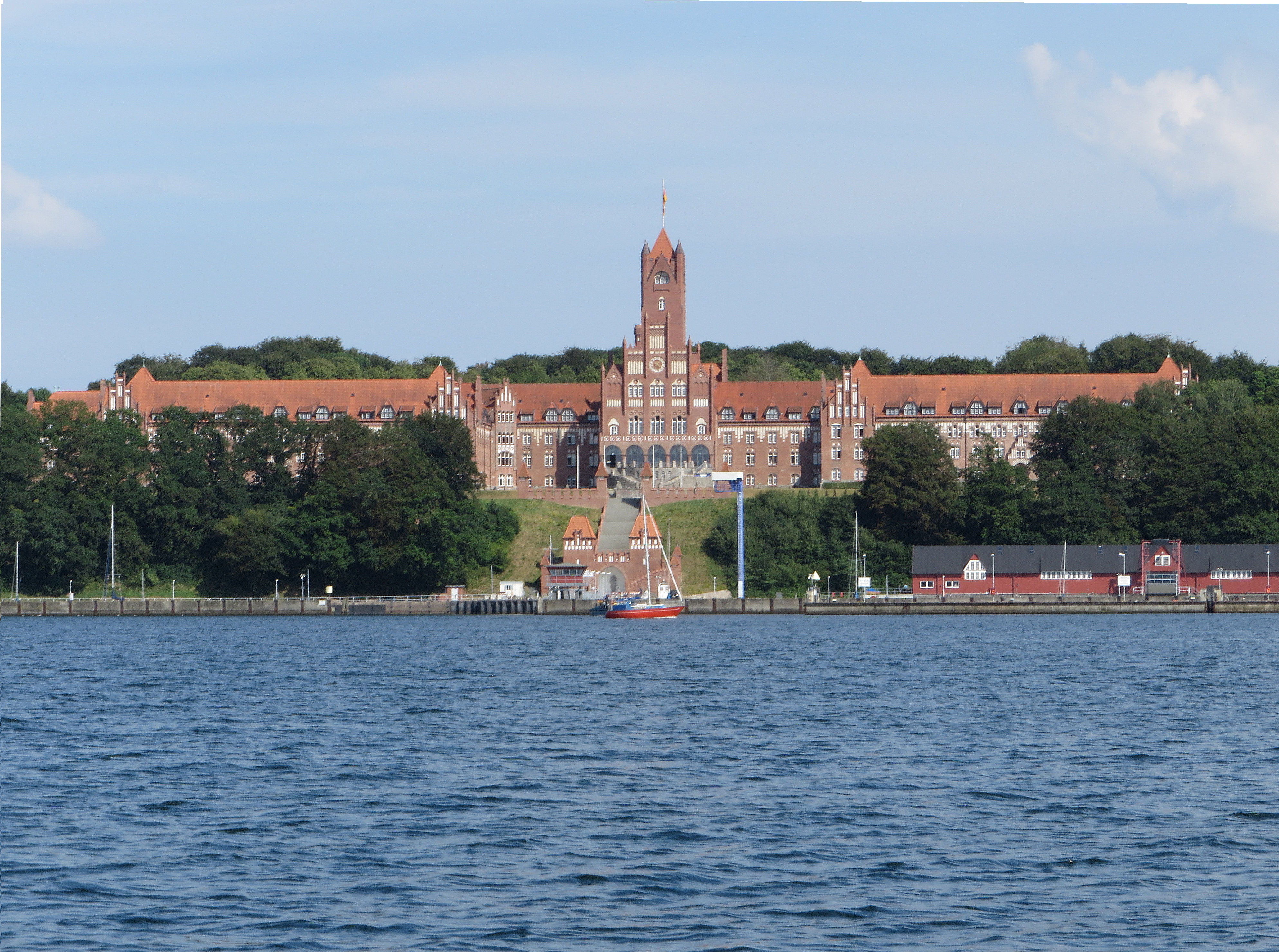 Das Rote Schloss am Meer (Flensburg-Mürwik Juli 2014), Bild 02